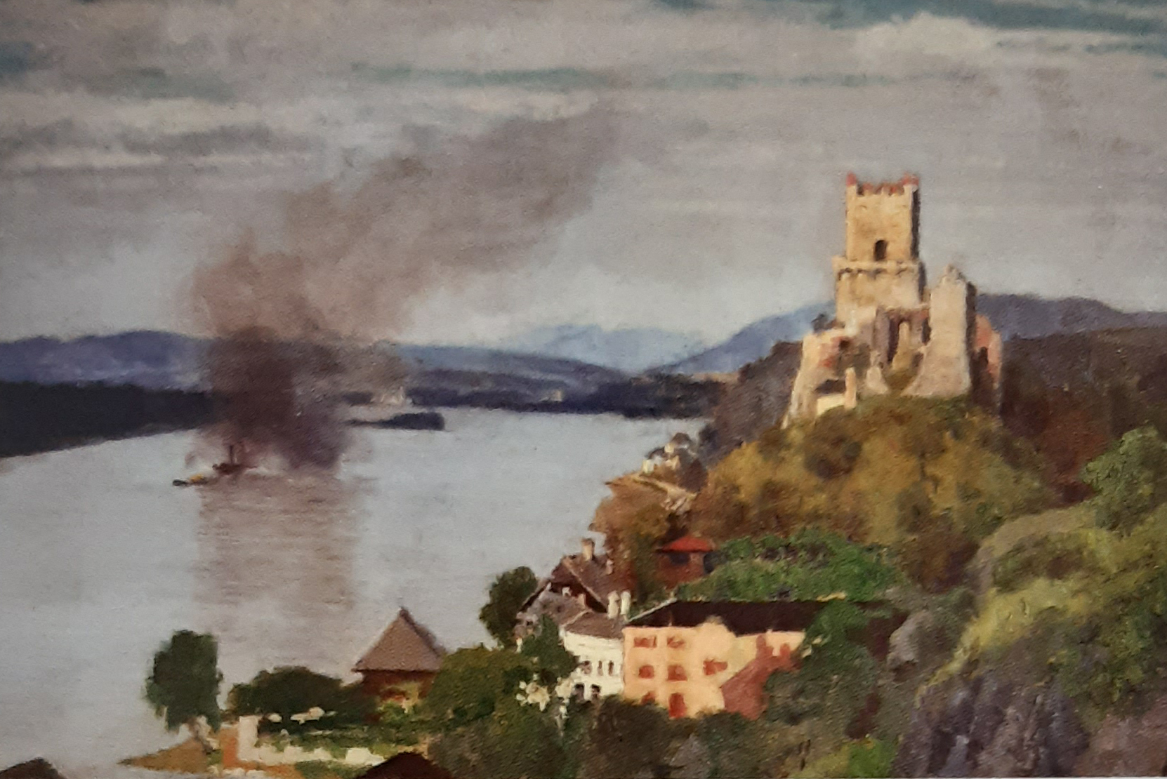 Brennender Raddampfer auf der Donau, um 1910, Öl auf Leinwand, 44 x 56 cm